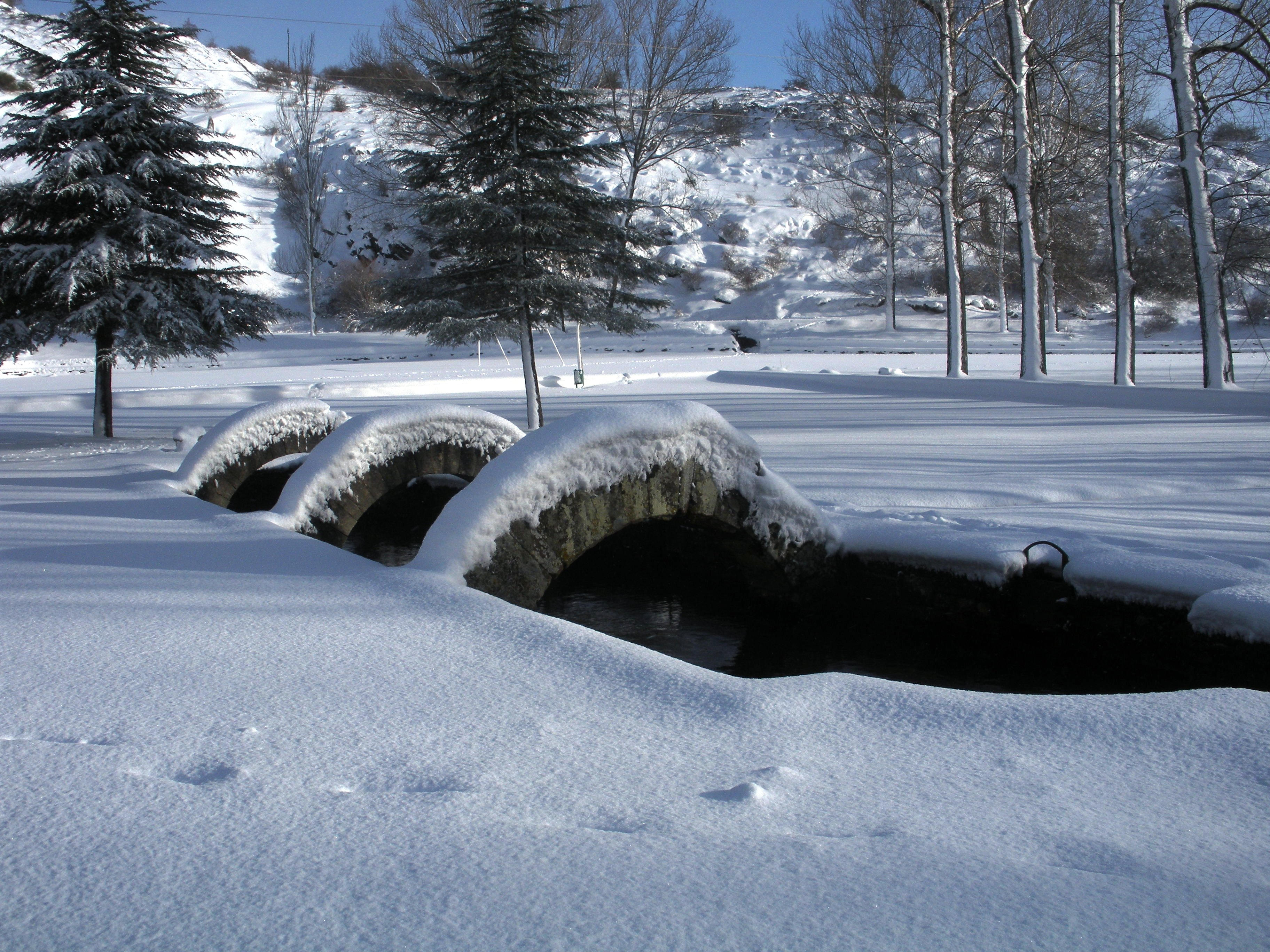 Imagen de las Fuentes Tamáricas, en Velilla del Río Carrión, España, tras una nevada.